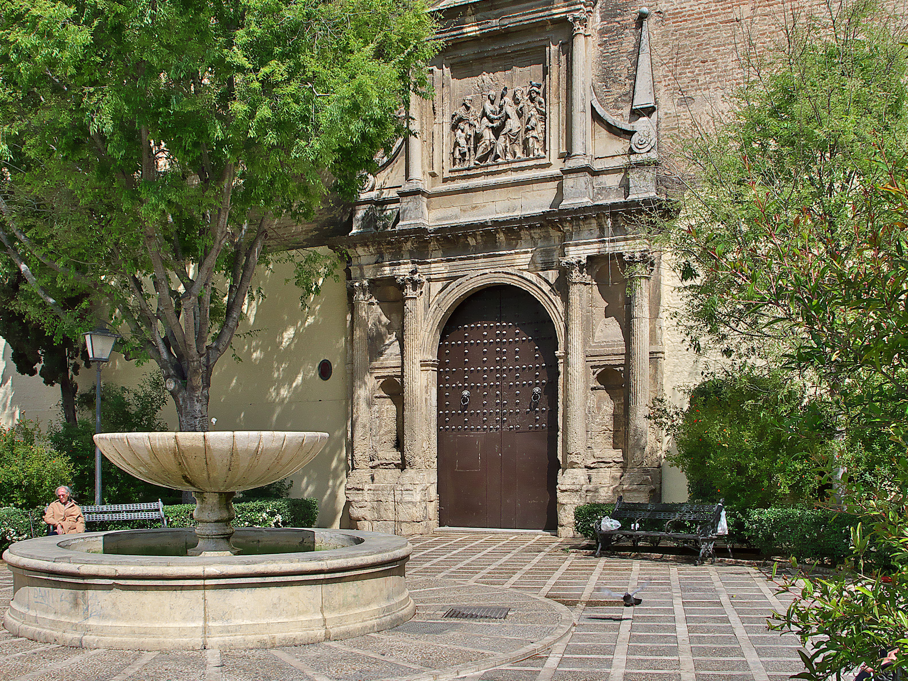 Convento de Santa Isabel (Sevilla). Diseña, Alonso de Vandelvira (1609). El relieve de la Visitación es de Andrés de Ocampo. Las Comendadoras de San Juan abandonaron este cenobio en 1835 debido a la Desamortización y las Hijas de María Dolorosa y de San Felipe Neri se establecieron en este convento de la Visitación de Santa Isabel en el año de 1869.